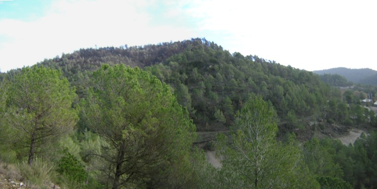 El Serrat de Baiones (Monistrol de Calders, Moià)